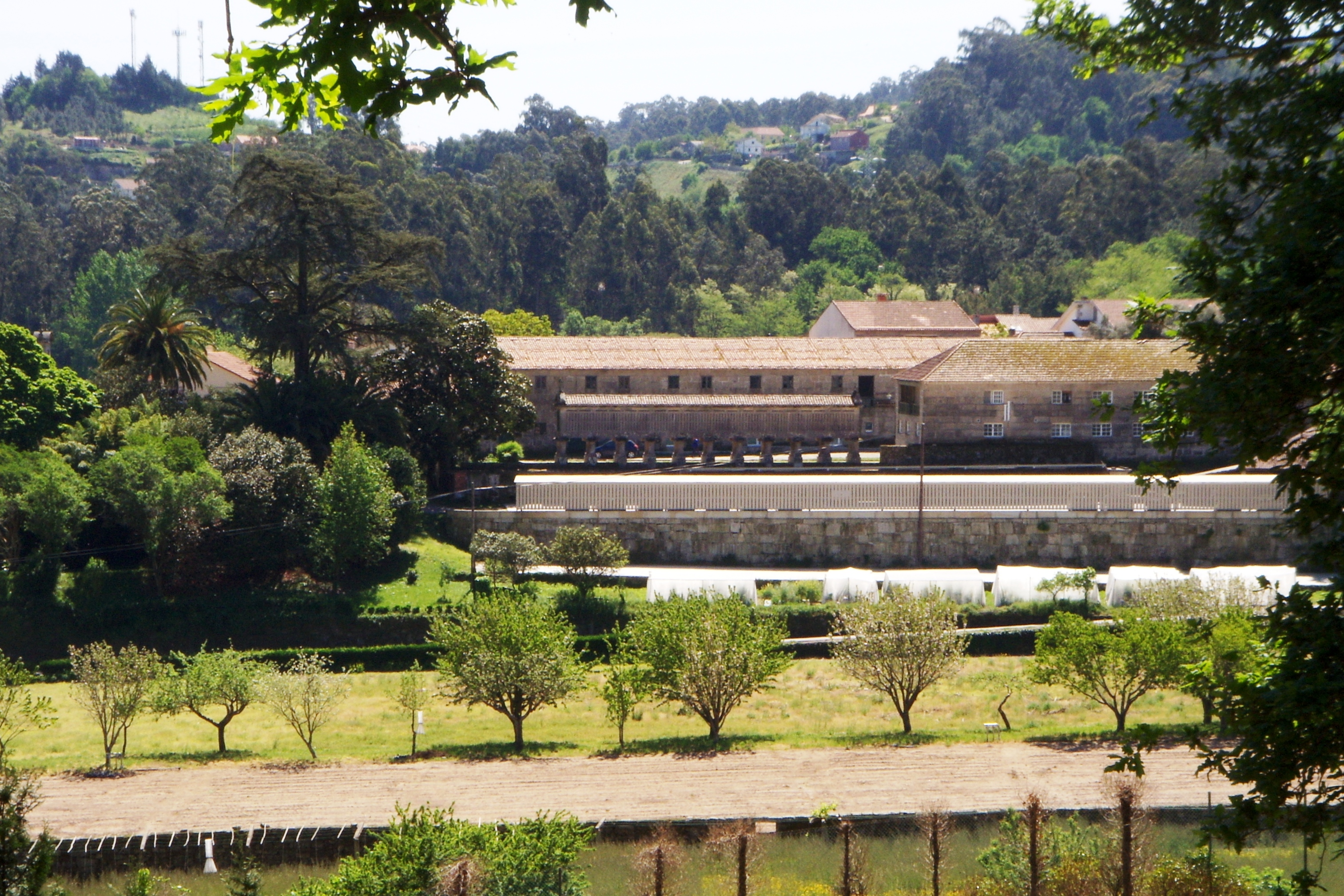 Instituto de Investigaciones Biológicas de Galicia, Pazo de la Carballeira de Gandarón. Salcedo, Pontevedra.